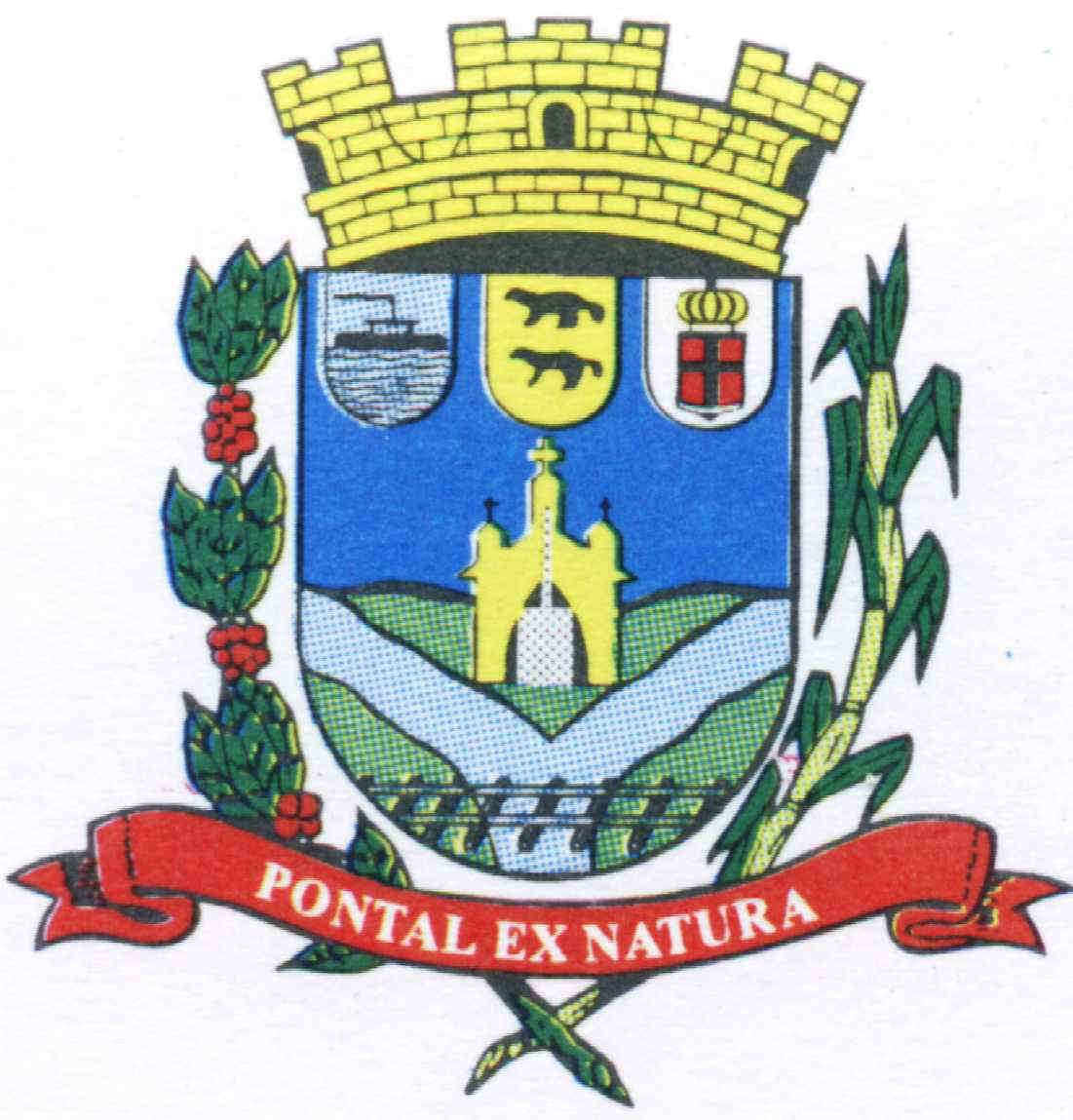 Brasão do Município de Pontal - SP